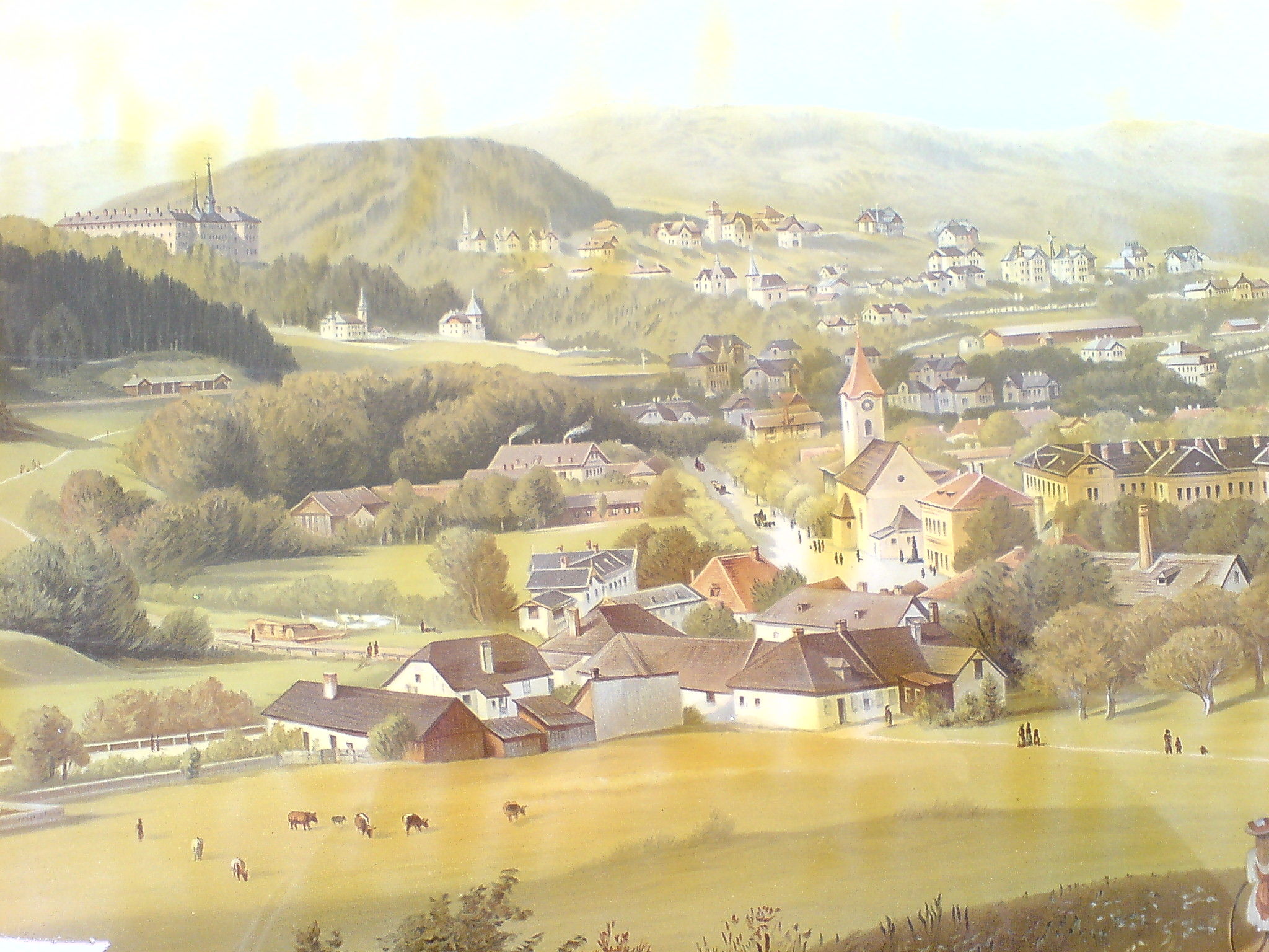 Ausschnitt aus einer Lithographie Zu sehen sind das Zentrum mit der alten Kirche, der Volksschule, der damals neu errichteten Westbahn und dem Kloster Sacre-Coeur.